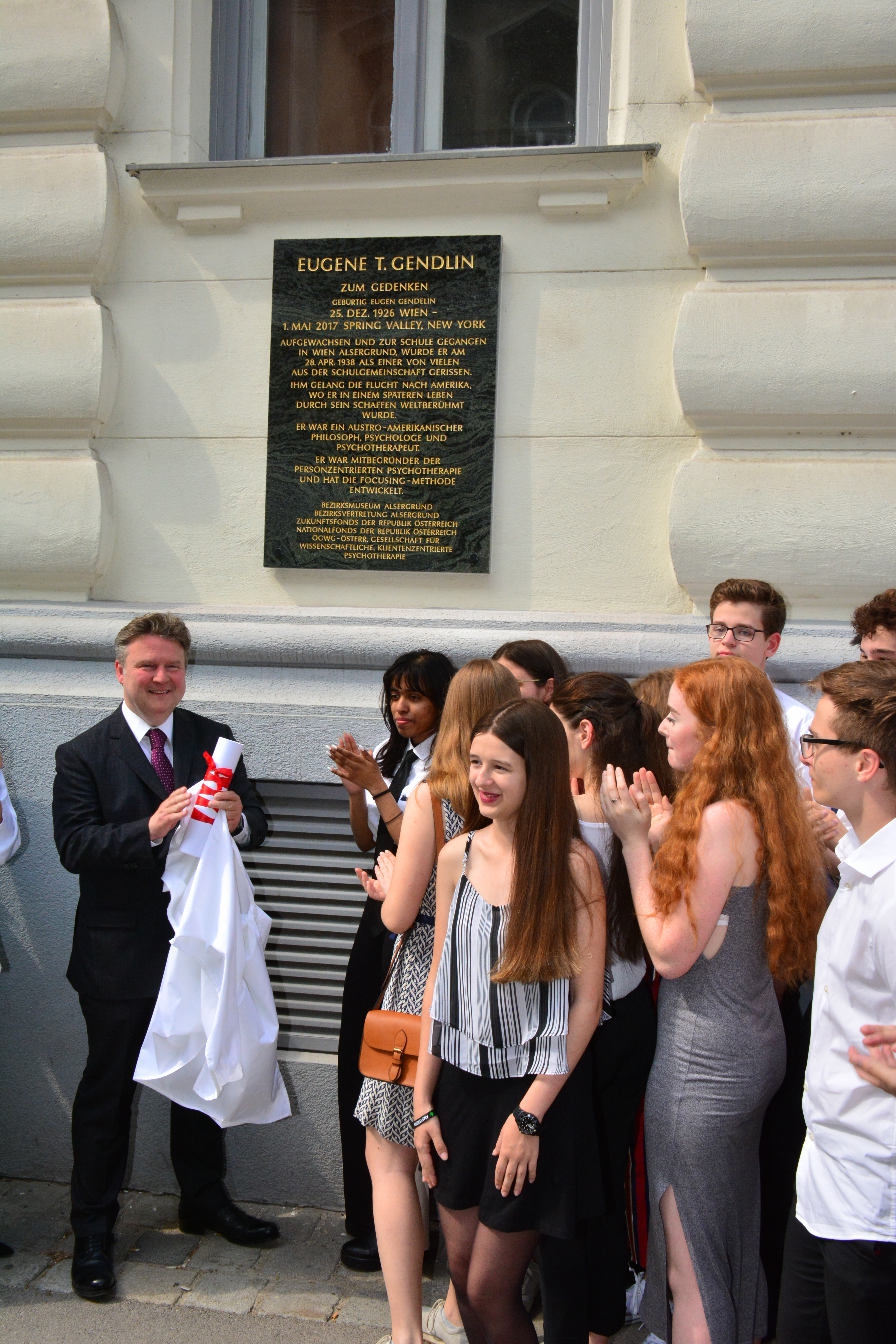 Gedenktafel für NS-Opfer (Wien, Glasergasse 25, Eugen T. Gendlin), enthüllt 2018-05-02